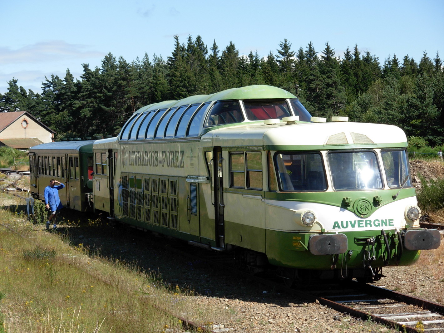 Panorama-Dieseltriebwagen Livradois-Forez in der Auvergne auf der Strecke: Ambert - La Chaise-Dieu